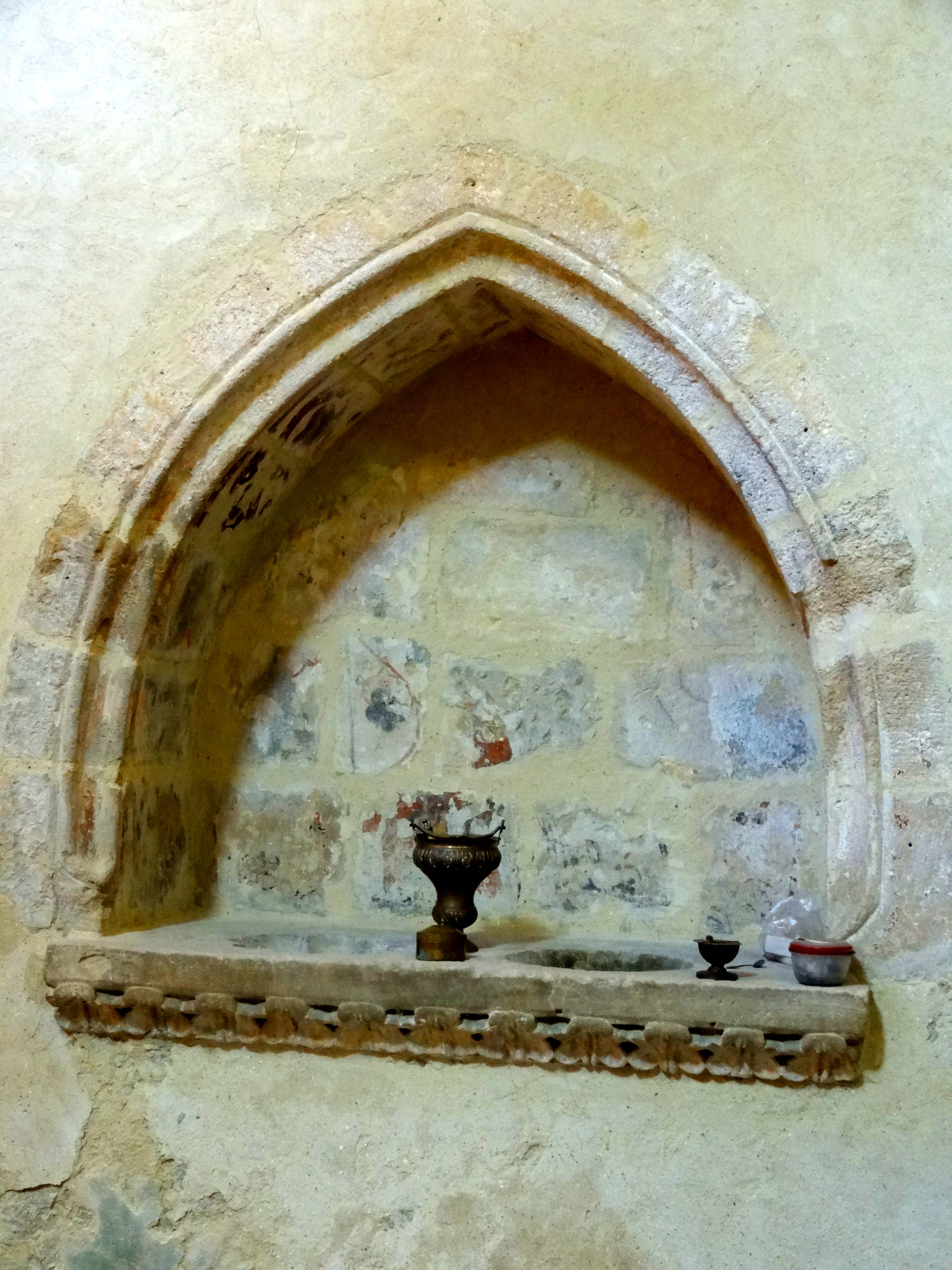 Intérieur de l'église - voir titre.